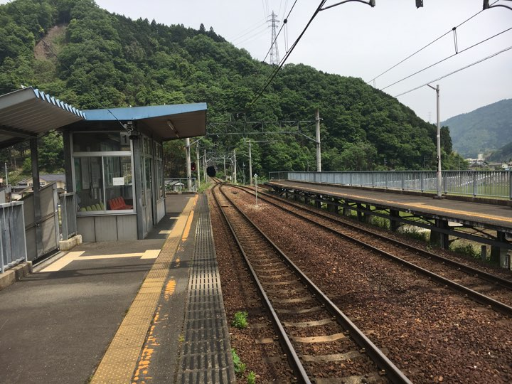 2017年5月12日撮影。1番線ホームより宮津側を撮影。